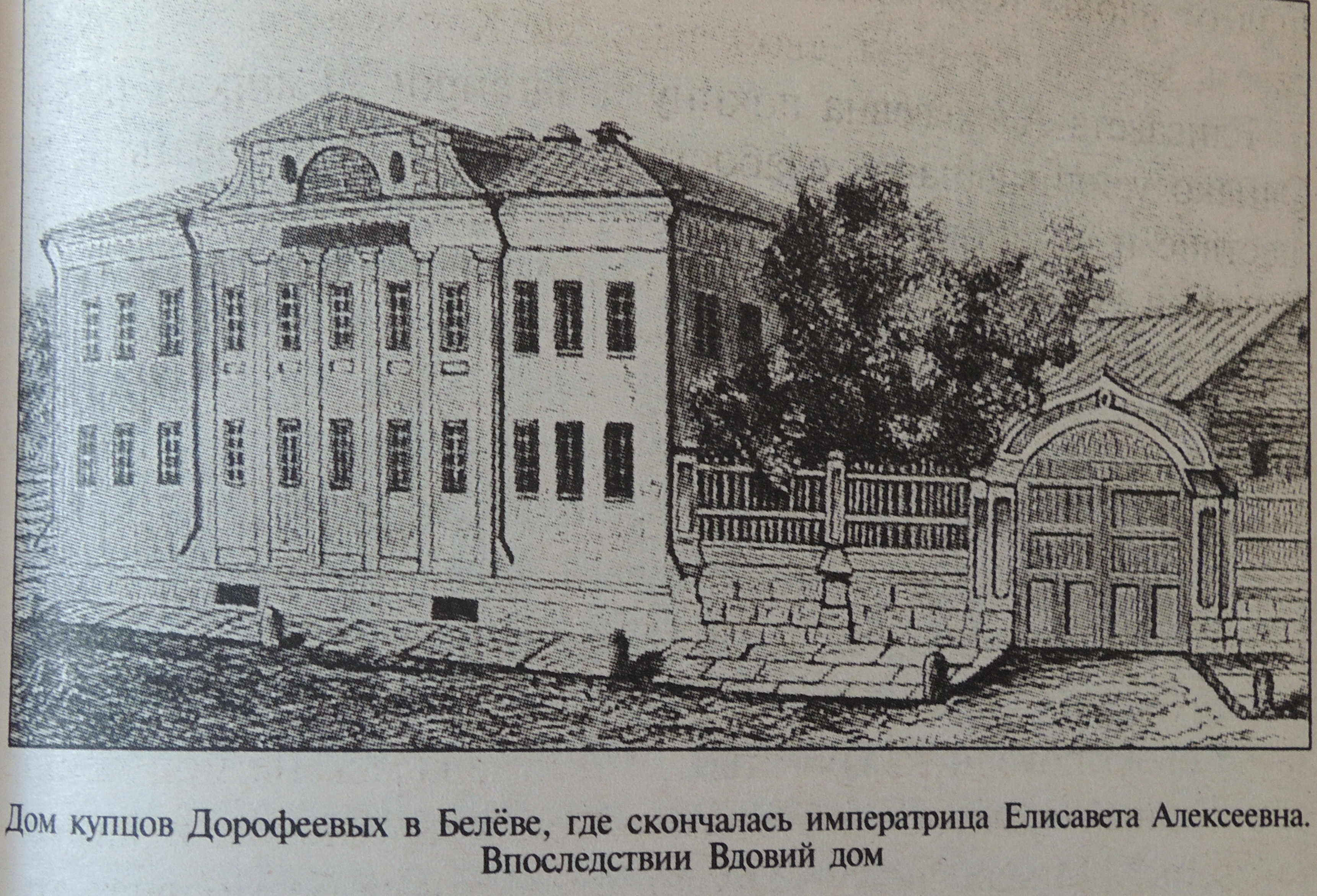 Дом купцов Дорофеевых в Белёве, где скончалась императрица Елизавета Алексеевна, впоследствии Вдовий дом